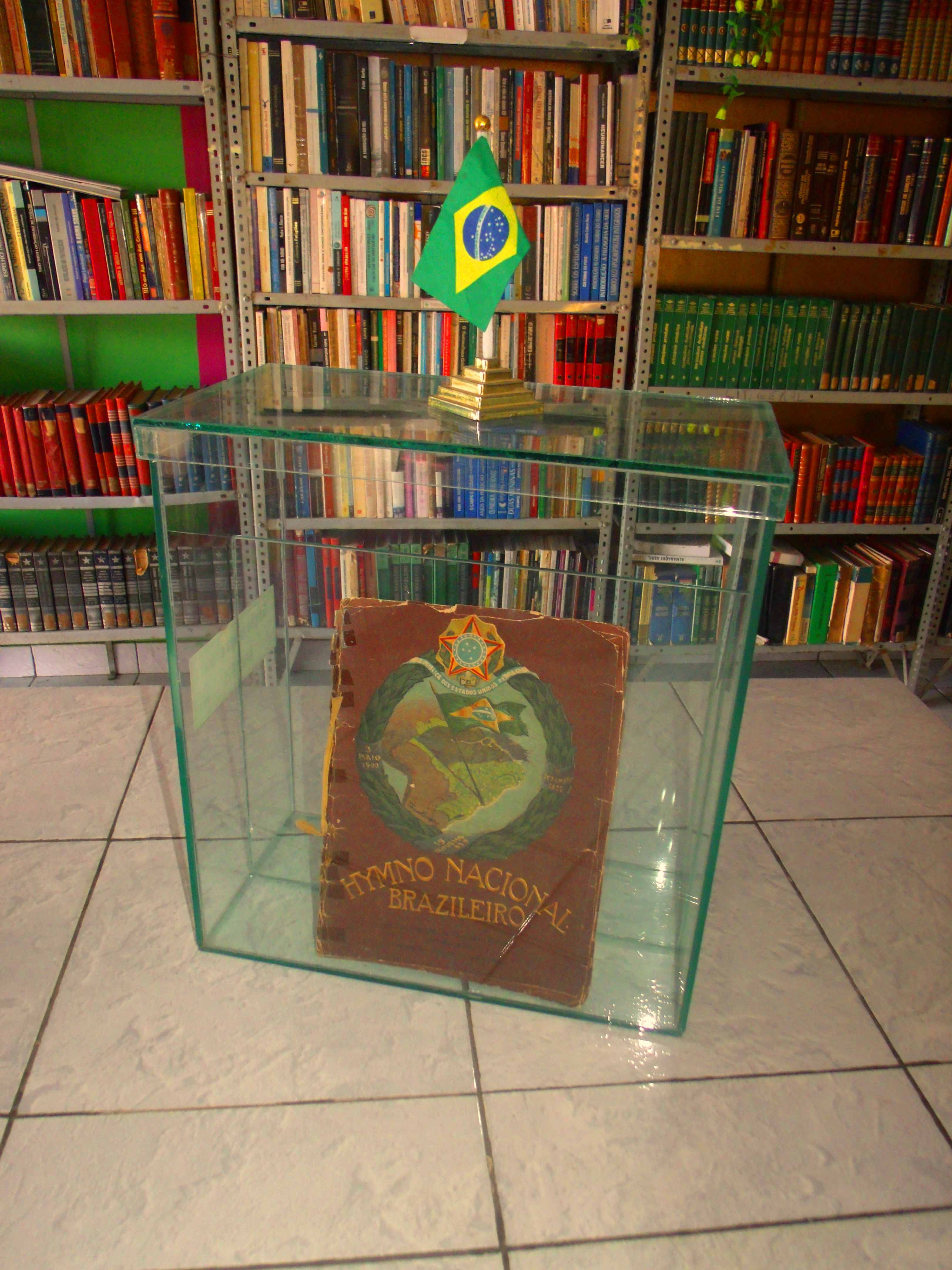 Vitrine no interior de uma biblioteca expondo um trabalho de 1922 que Teodoro Braga fez sobre o Hino Nacional do Brasil